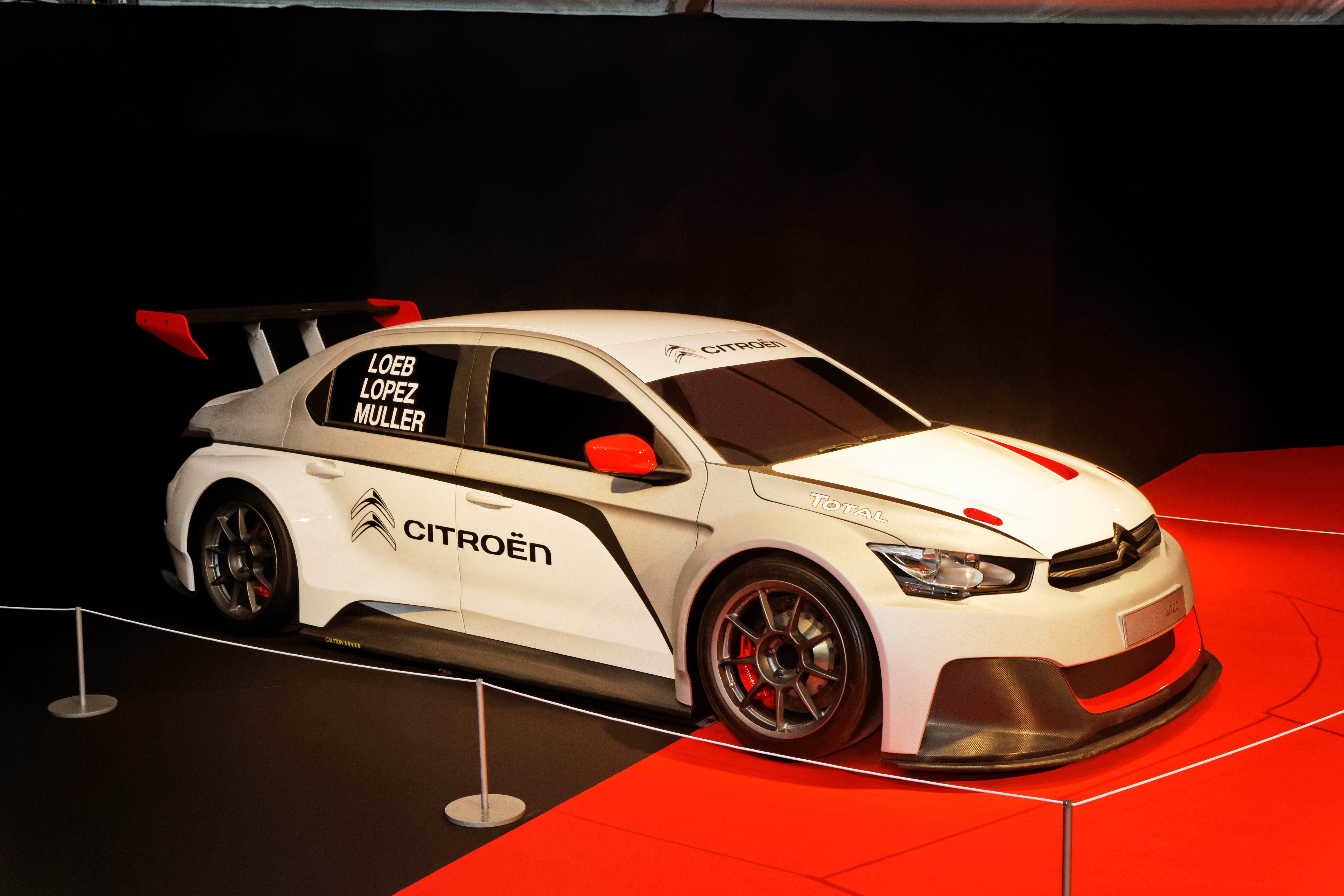 La Citroën C-Elysée exposée lors du festival automobile international 2014.